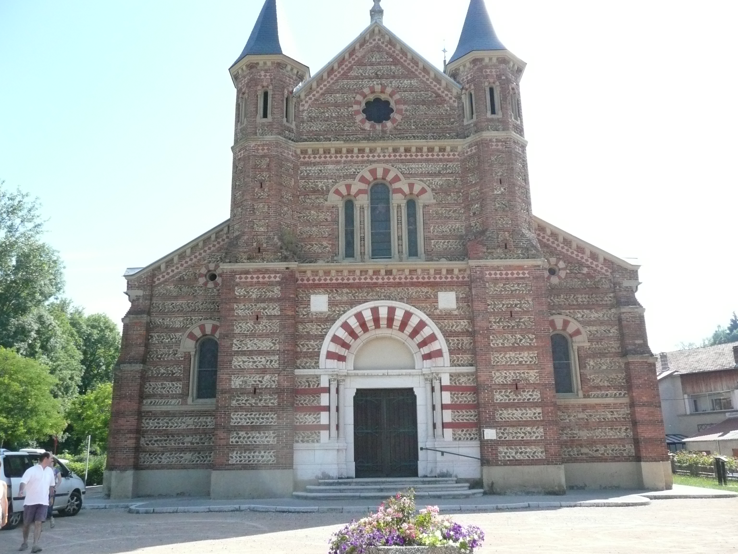 église de Roybon dans l'Isère faite en galets et briques